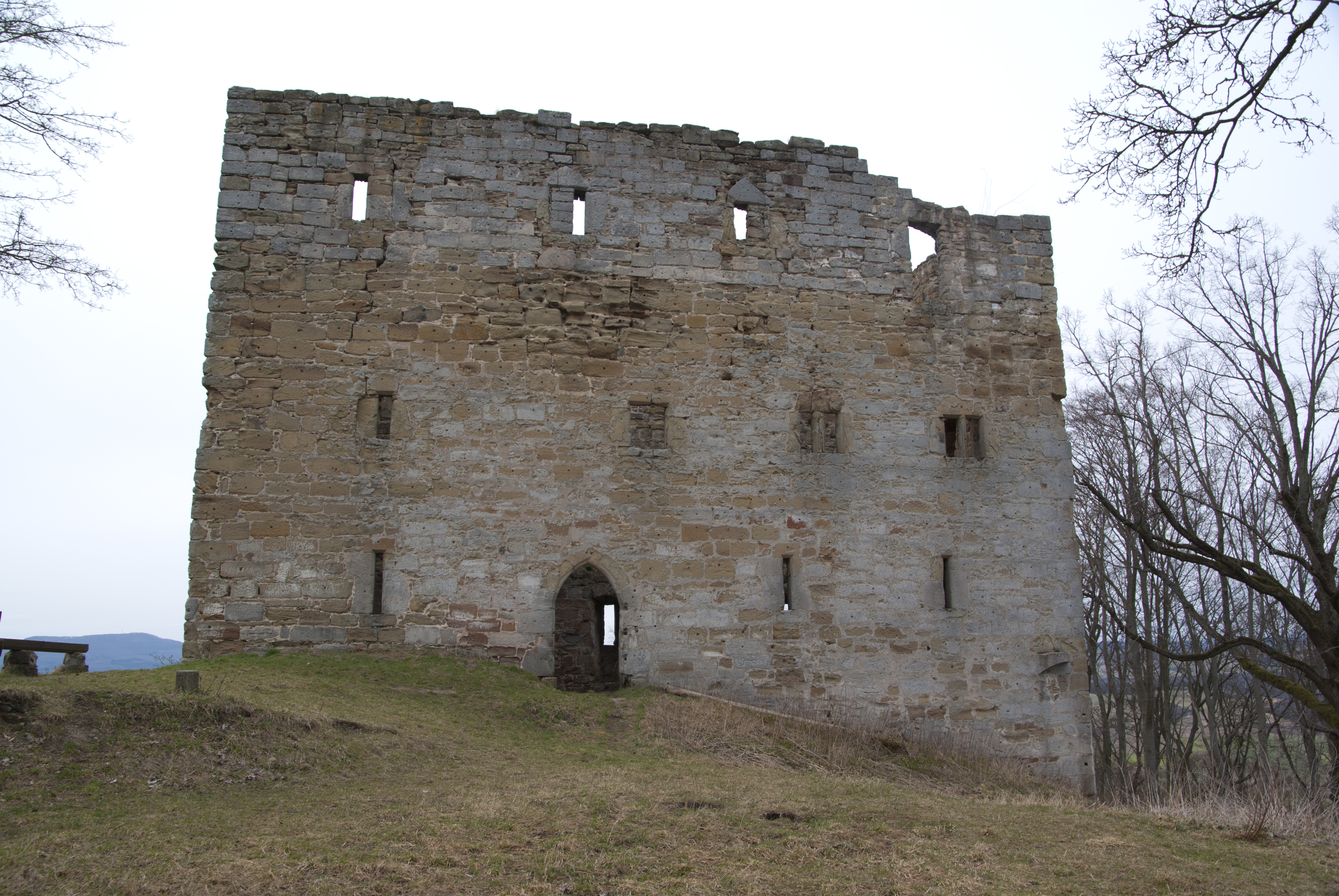 Burgruine Straufhain.